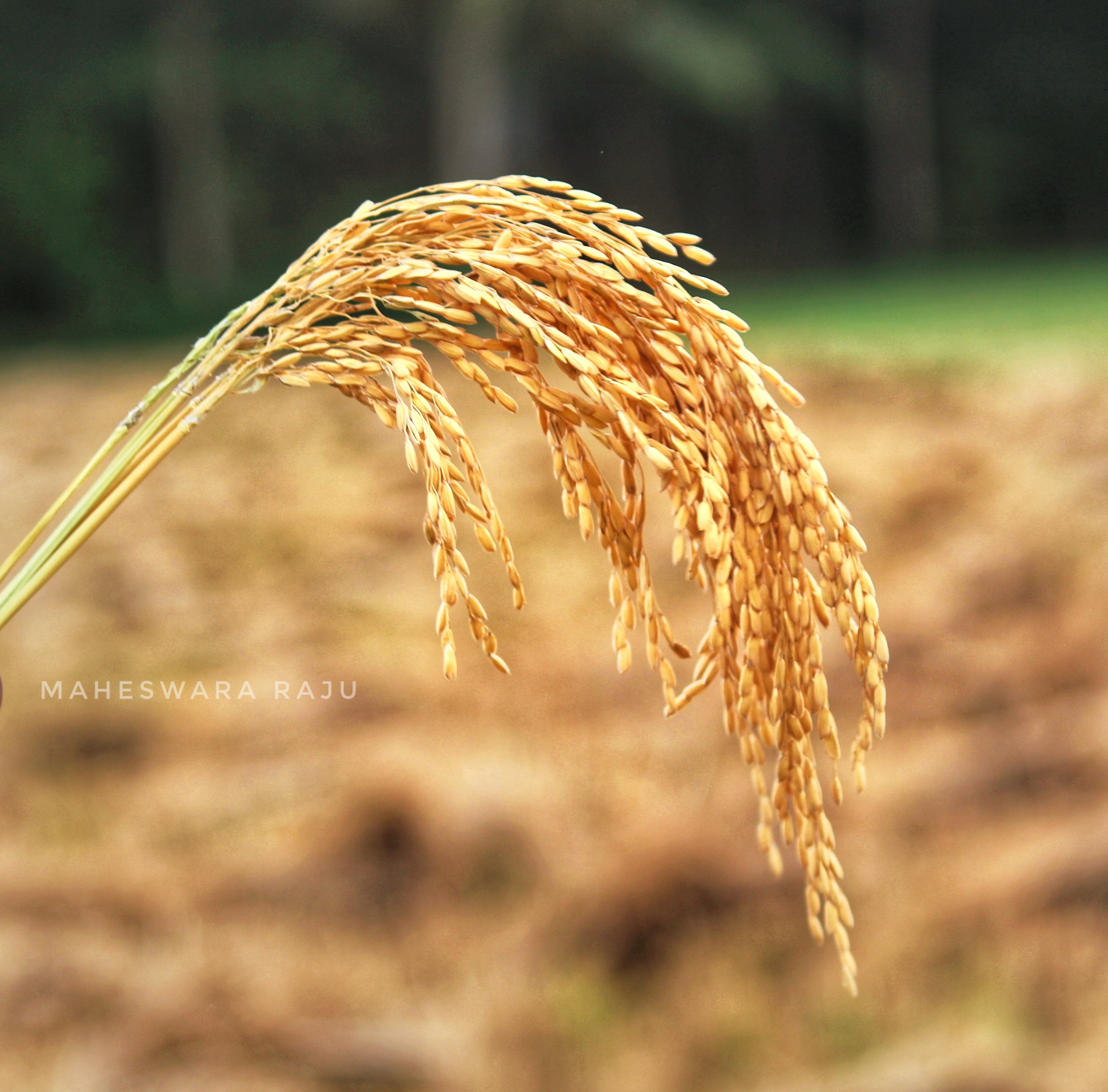 వరి కంకి